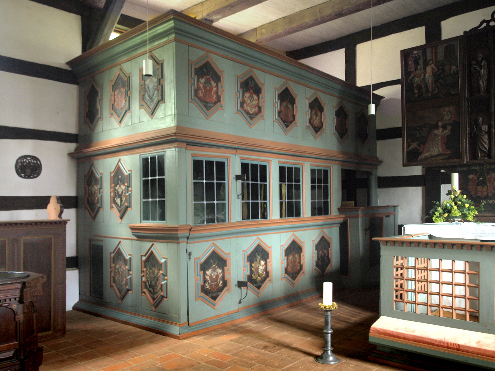 Stuer (Mecklenburg-Vorpommern), Dorfkirche, Patronatsloge Nord, Foto: 2012